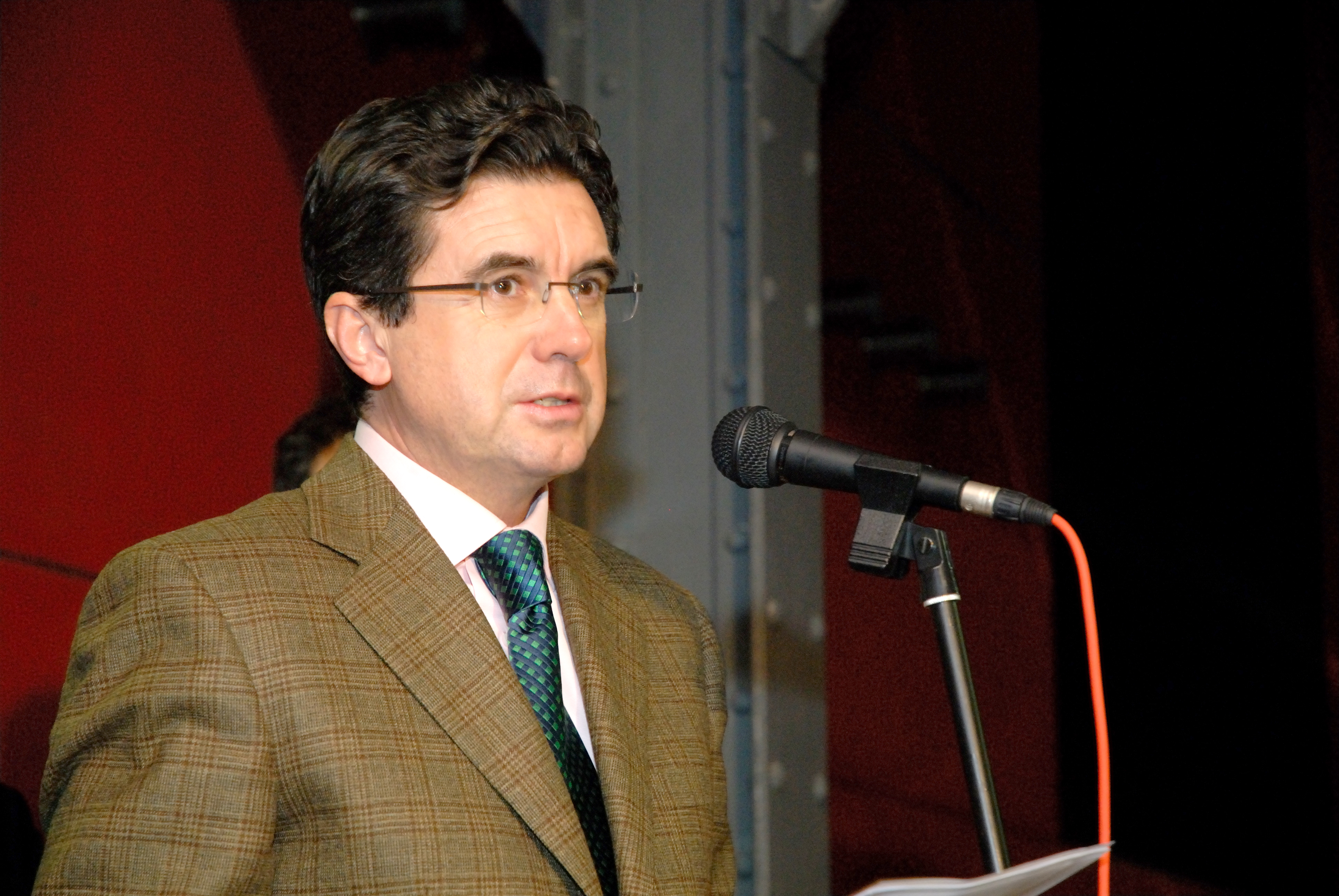 Jaume Matas al MHC el 2006.